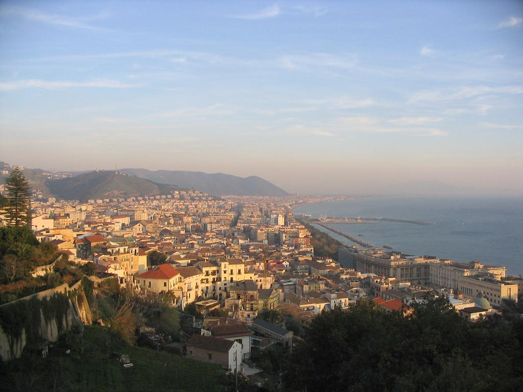 Salerno vista dal quartiere Canalone